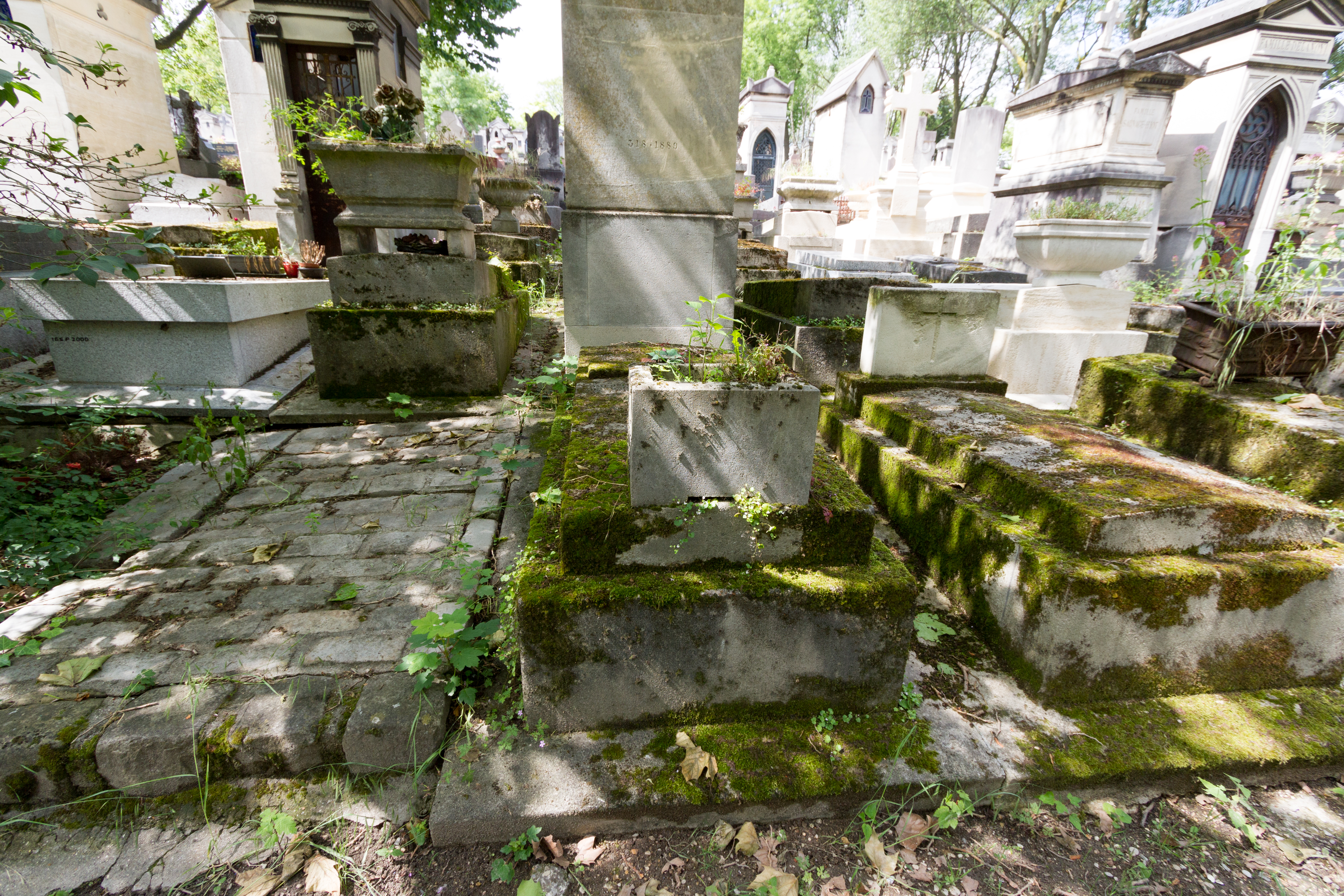 Sépulture de Xavier Leroux (1863-1919), compositeur, époux de la cantatrice réputée Meyrianne Héglon (1862-1942).